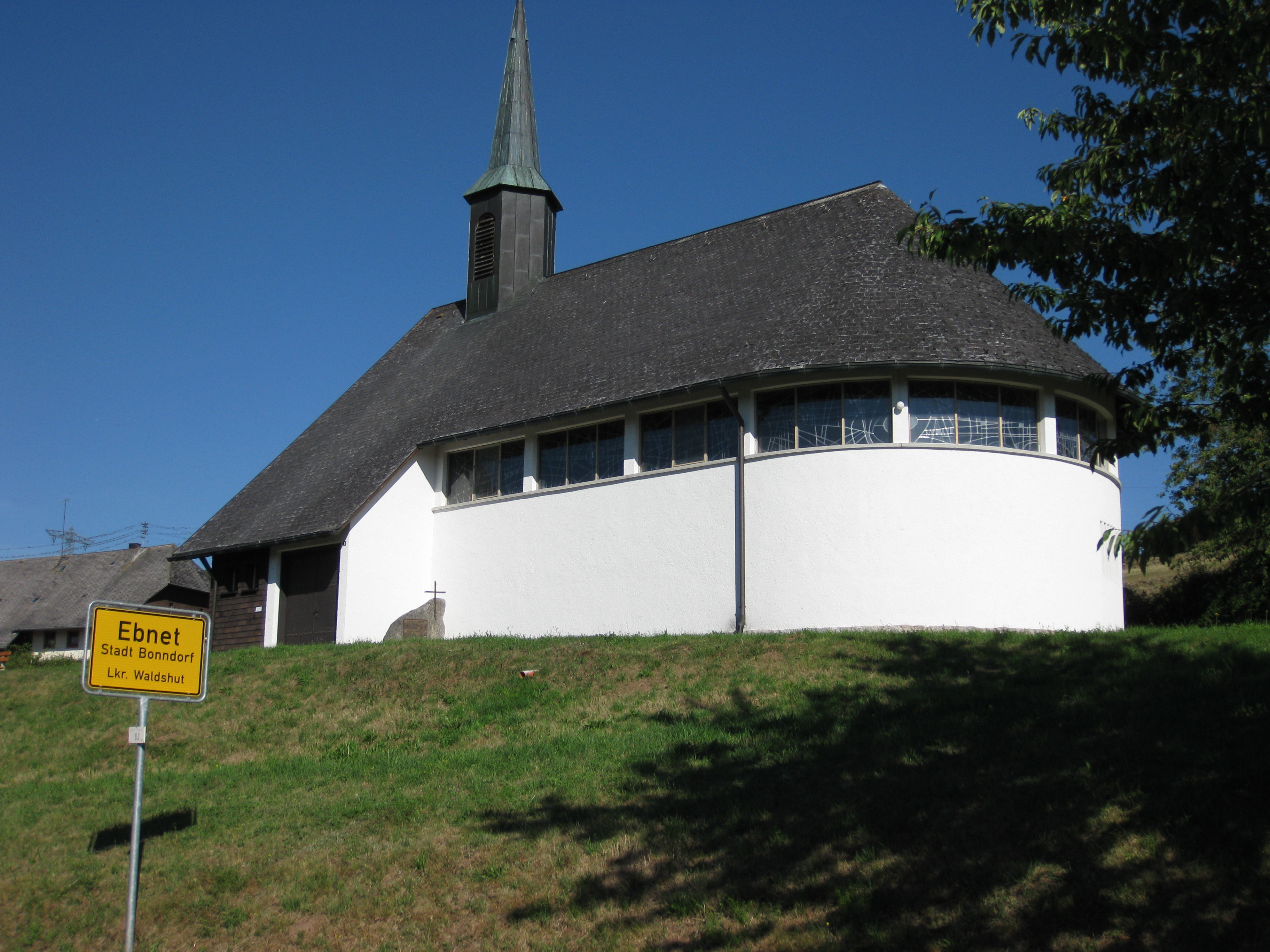 St. Anna Kapelle in Ebnet (Ortsteil der Stadt Bonndorf)